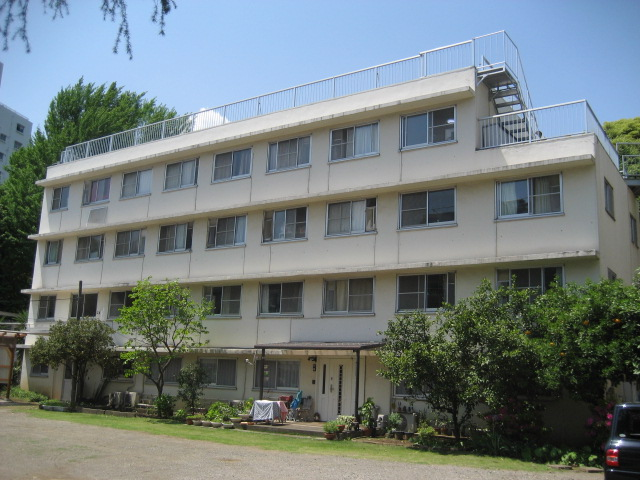 三河寮旧館